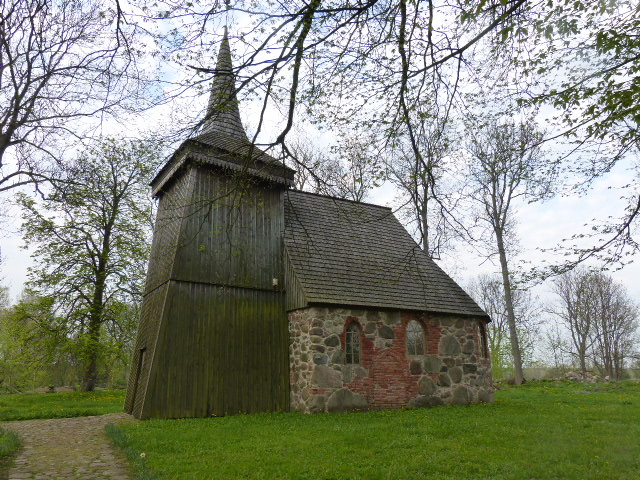 Unieradz - rzymskokatolicki kościół filialny p.w. św. Michała Archanioła, XIII (jeden z najstarszych kościołów na Pomorzu)